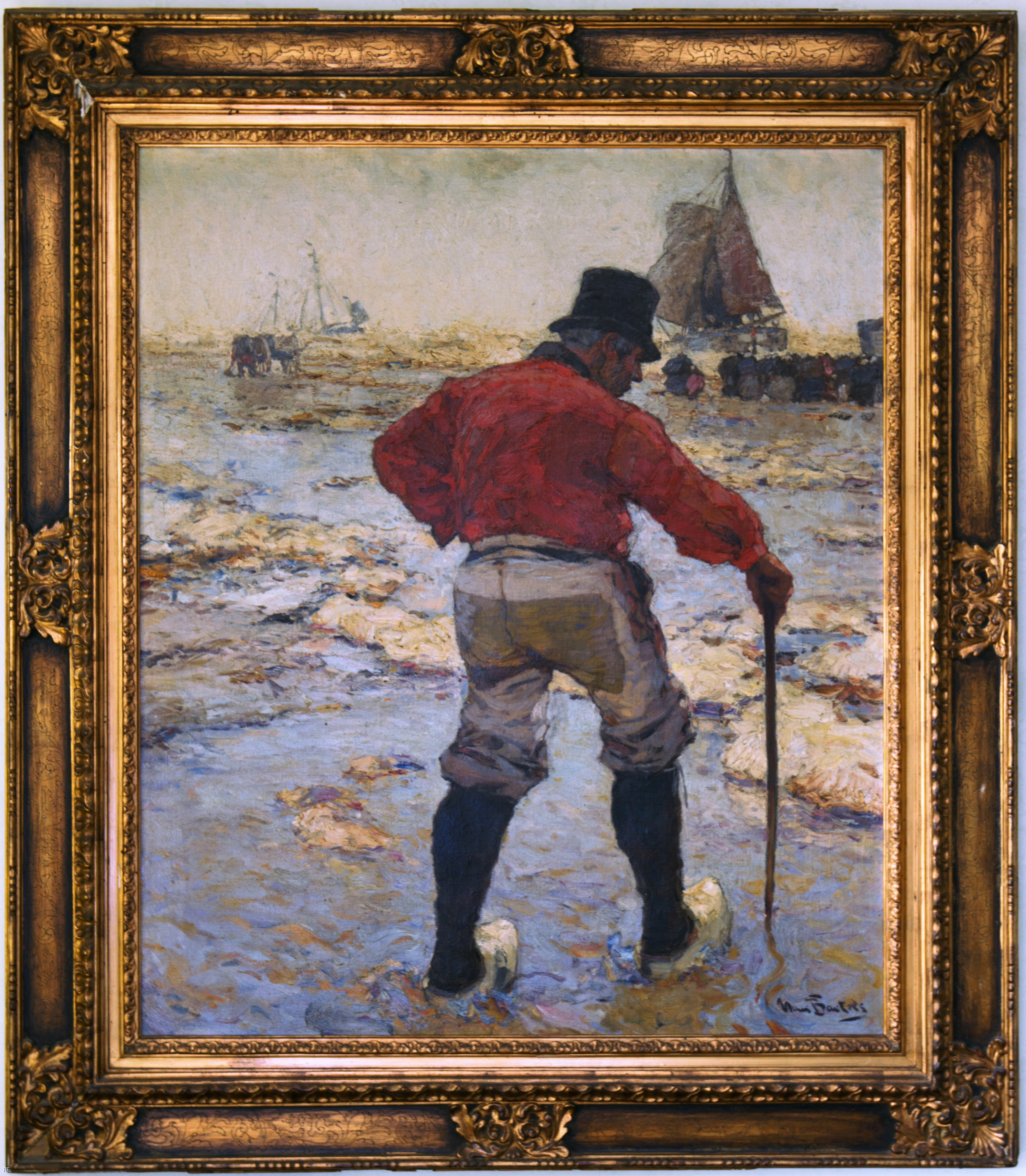 Briefträger im Wattenmeer, Maler: Hans von Bartels, Öl auf Leinwand